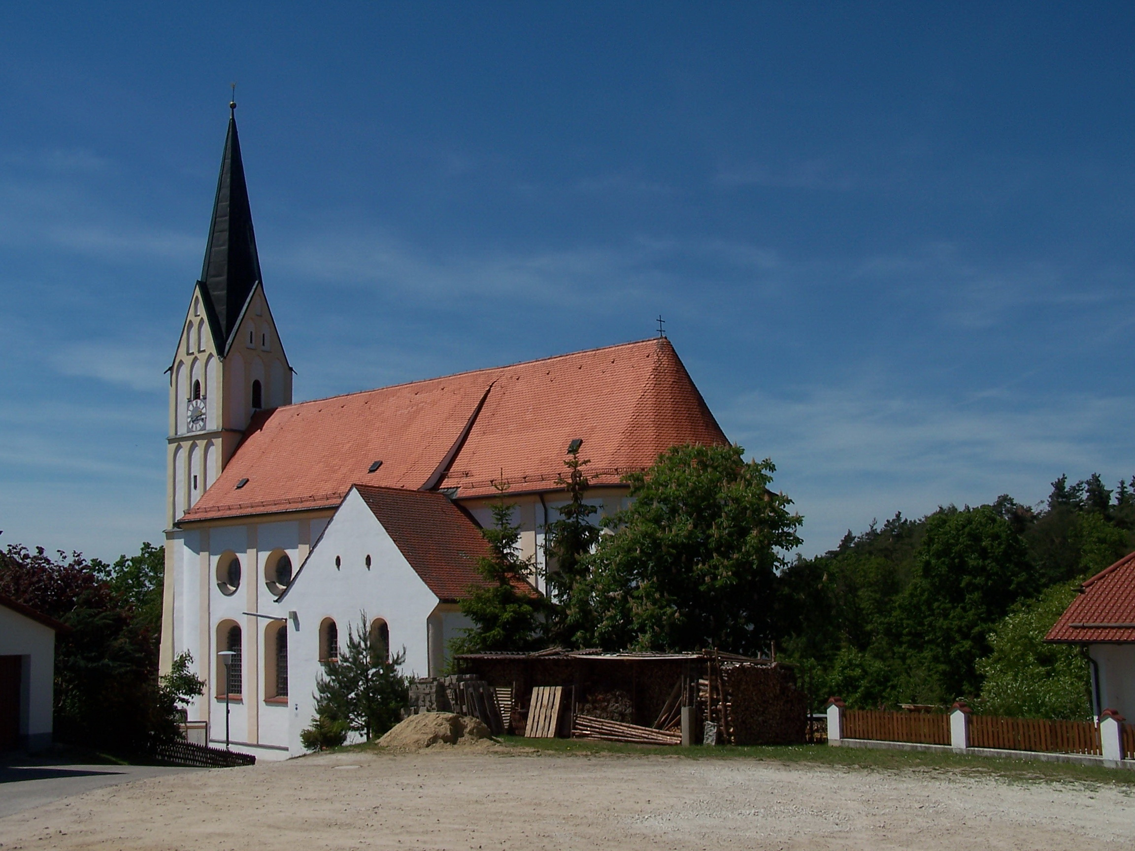 Rottenburg an der Laaber. Oberotterbach, Wallfahrtskirche St. Leonhard. Mitte 18. Jahrhundert von Johann Georg Hirschstötter errichtet, Turm 13. und 15. Jahrhundert; mit Ausstattung.